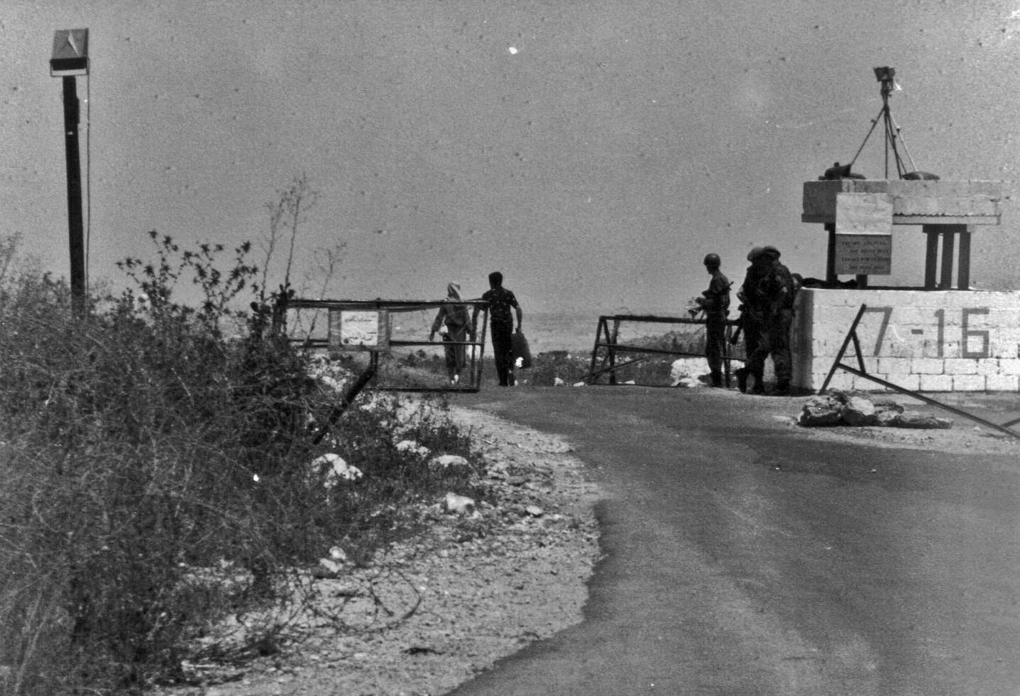 Roadblock Al-Yatun Dutchbatt